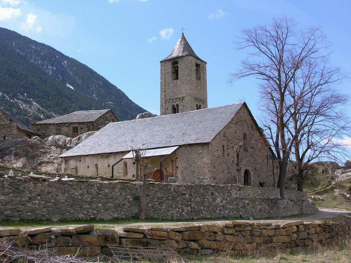 Església de Sant Joan de Boí (La Vall de Boí, Catalunya).